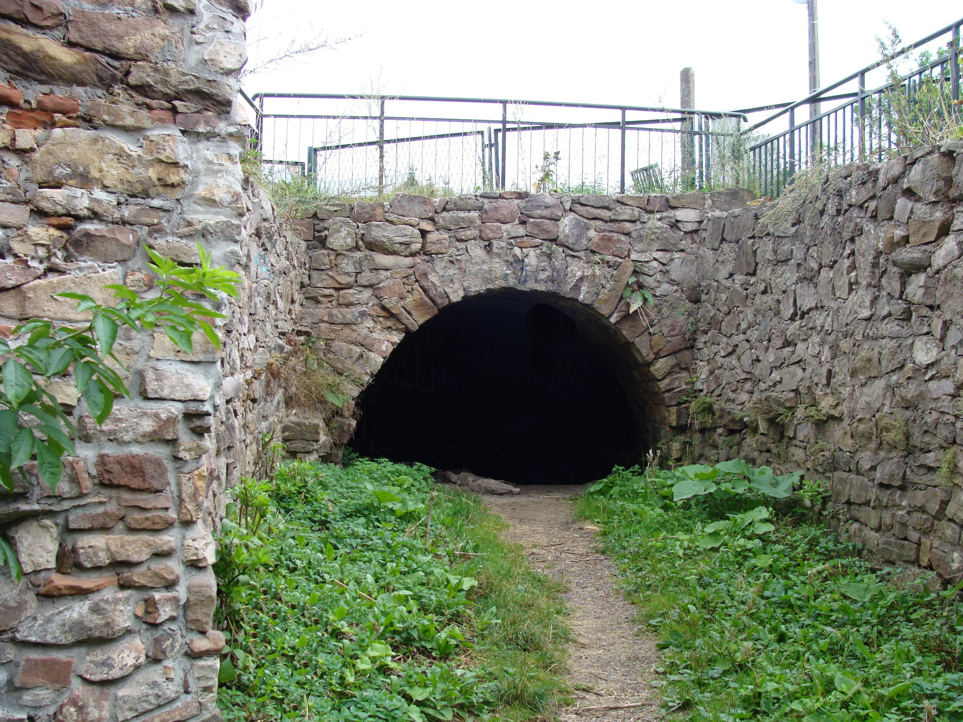 Kanał doprowadzający wodę ze zbiornika (obecnie po drugiej stronie ulicy) do koła wodnego poruszającego młot kuźnicy w Samsonowie.